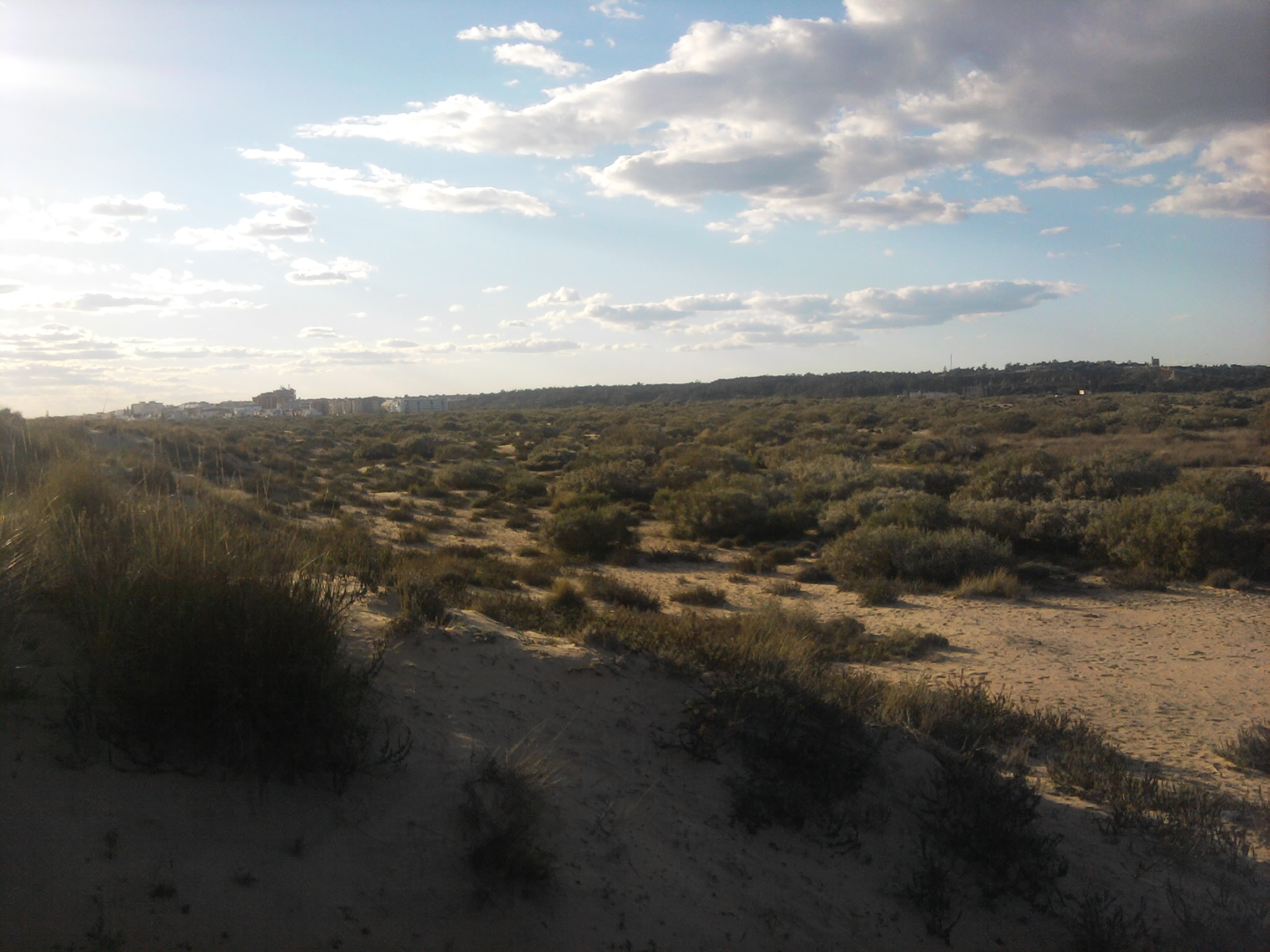 Vista del Paraje Natural Marismas del Río Piedras y Flecha del Rompido desde Nueva Umbría, con La Antilla y la Torre del Catalán al fondo.